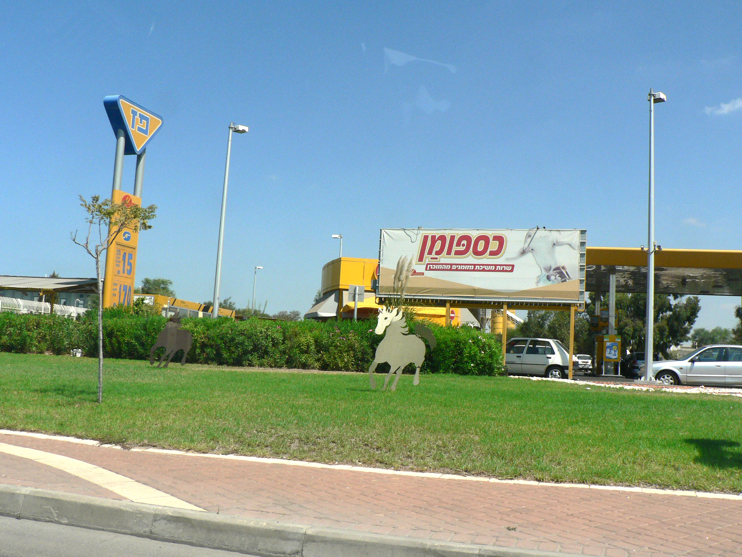 Paz gas station, Yavne, Israel תחנת דלק פז ביבנה